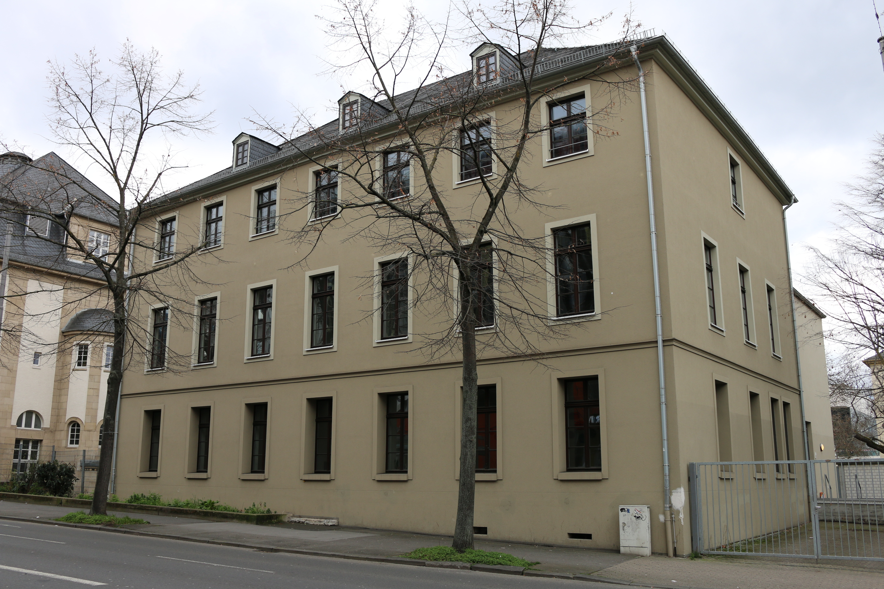 Wiesbaden: Denkmalgeschütztes Gebäude Dotzheimer Straße 3, ehemaliges Militärhospital (1828/29-1840) und Offizierschule (Ab 1841 bis um 1912) der Nassauischen Infateriekaseren